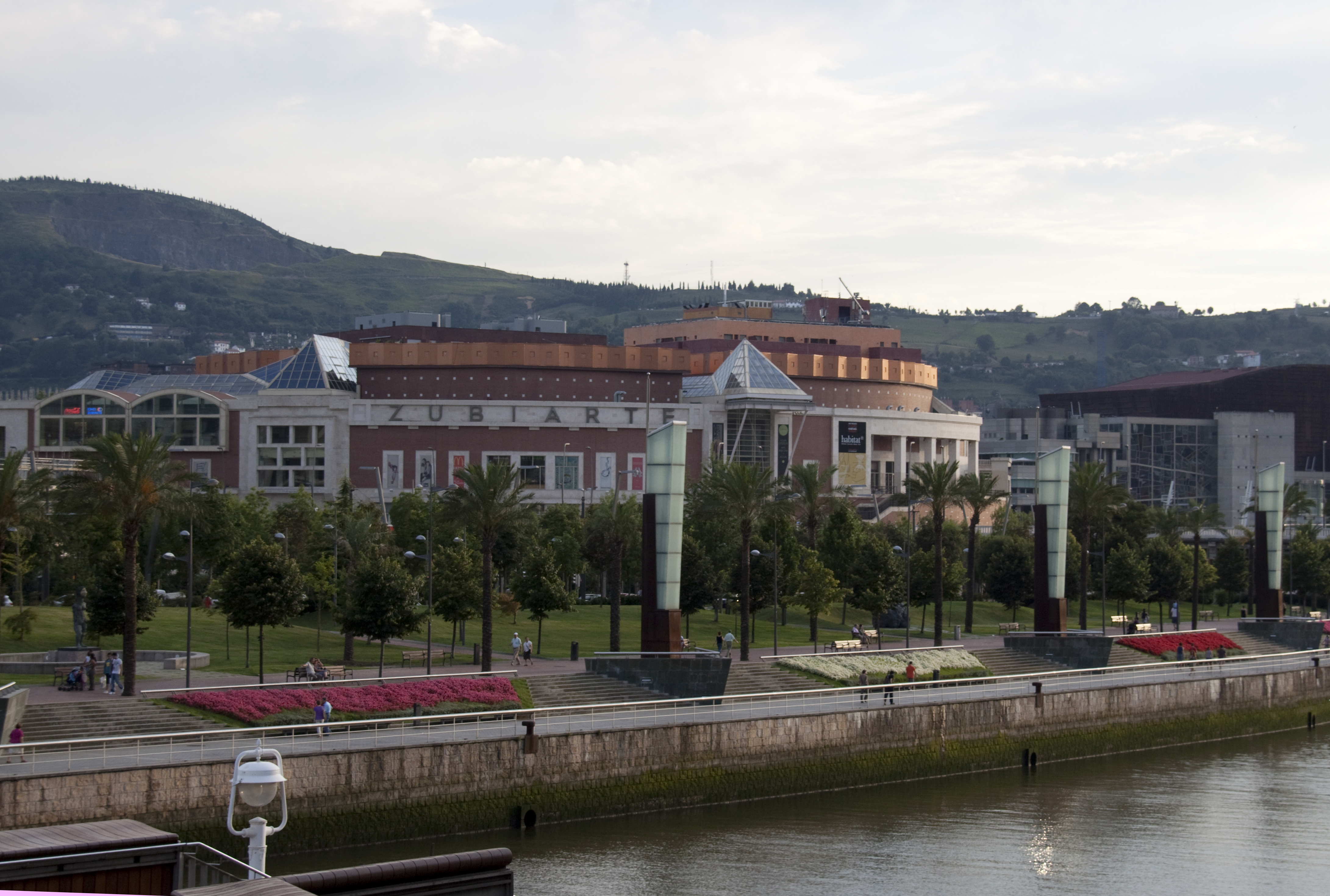 Zubiarte Bilboa